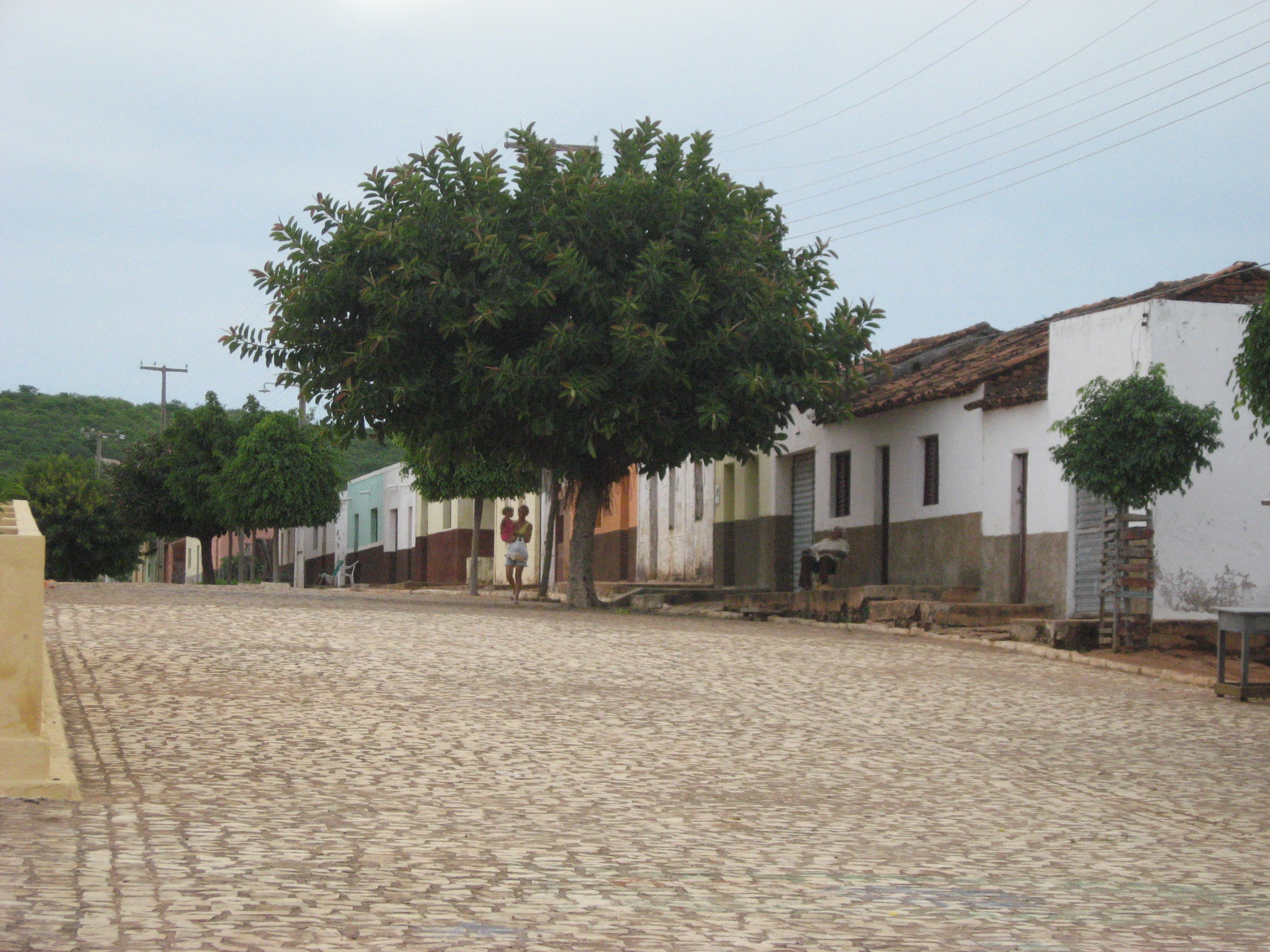 Residências em Quixaba de Cima